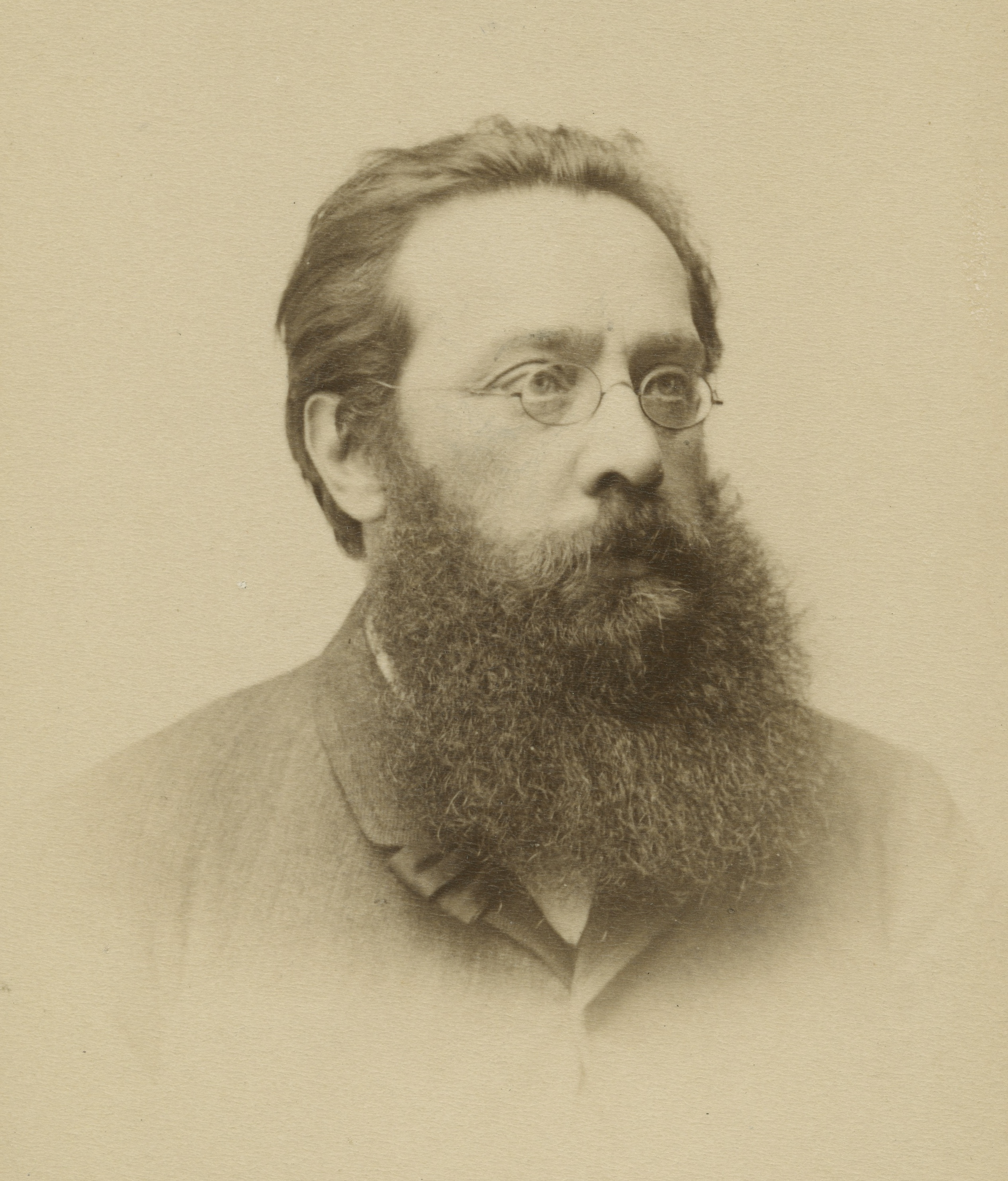 Stanisław Wiktor Mieczyński (1842-1910) - polski nauczyciel, tłumacz, encyklopedysta, działacz patriotyczny